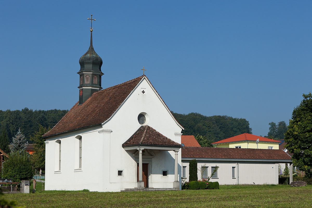 St. Josephskapelle in Rüstenschwil, Gemeinde Auw (AG)